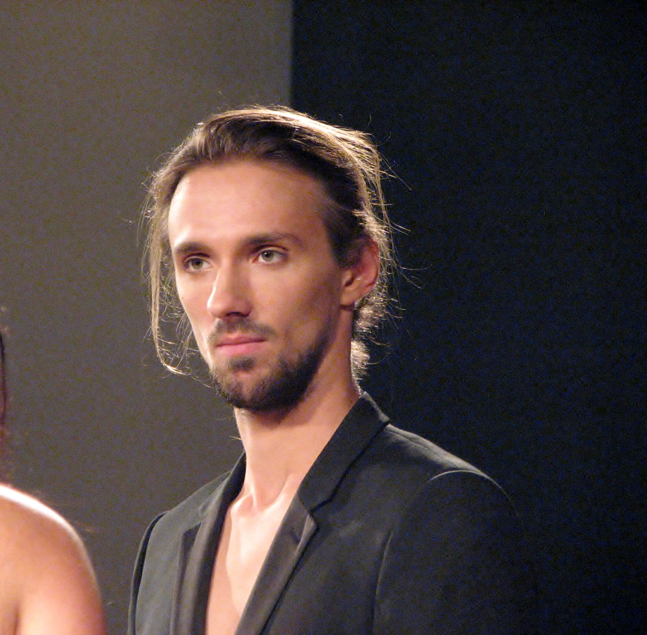 Roman Maksimuk Tallinna Kirjanike Maja laval festivali III Dovlatovi Päevad Tallinnas raames